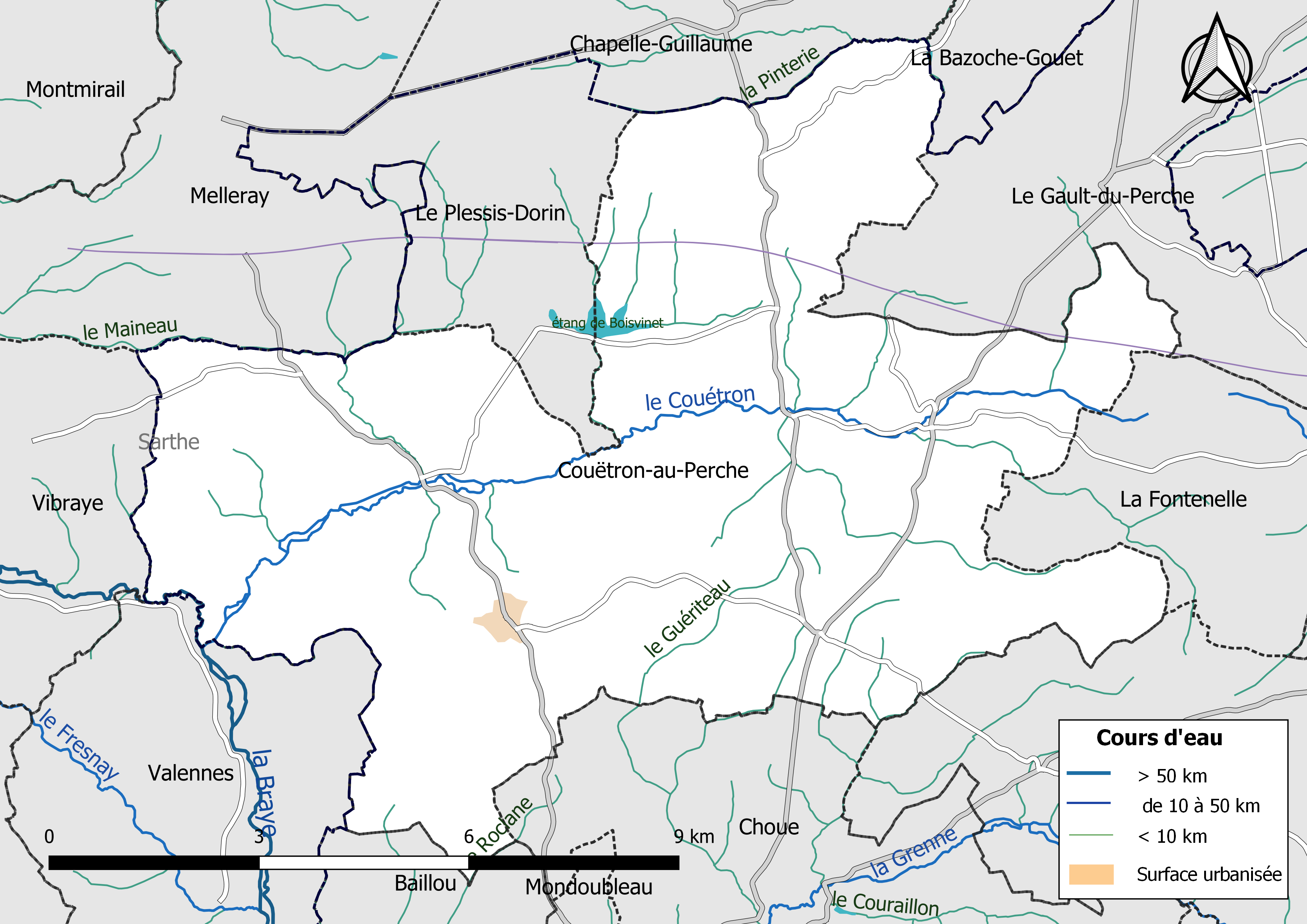 Carte du réseau hydrographique de la commune de Couëtron-au-Perche (Loir-et-Cher, France).